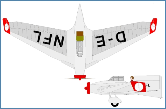 Lippisch DFS39